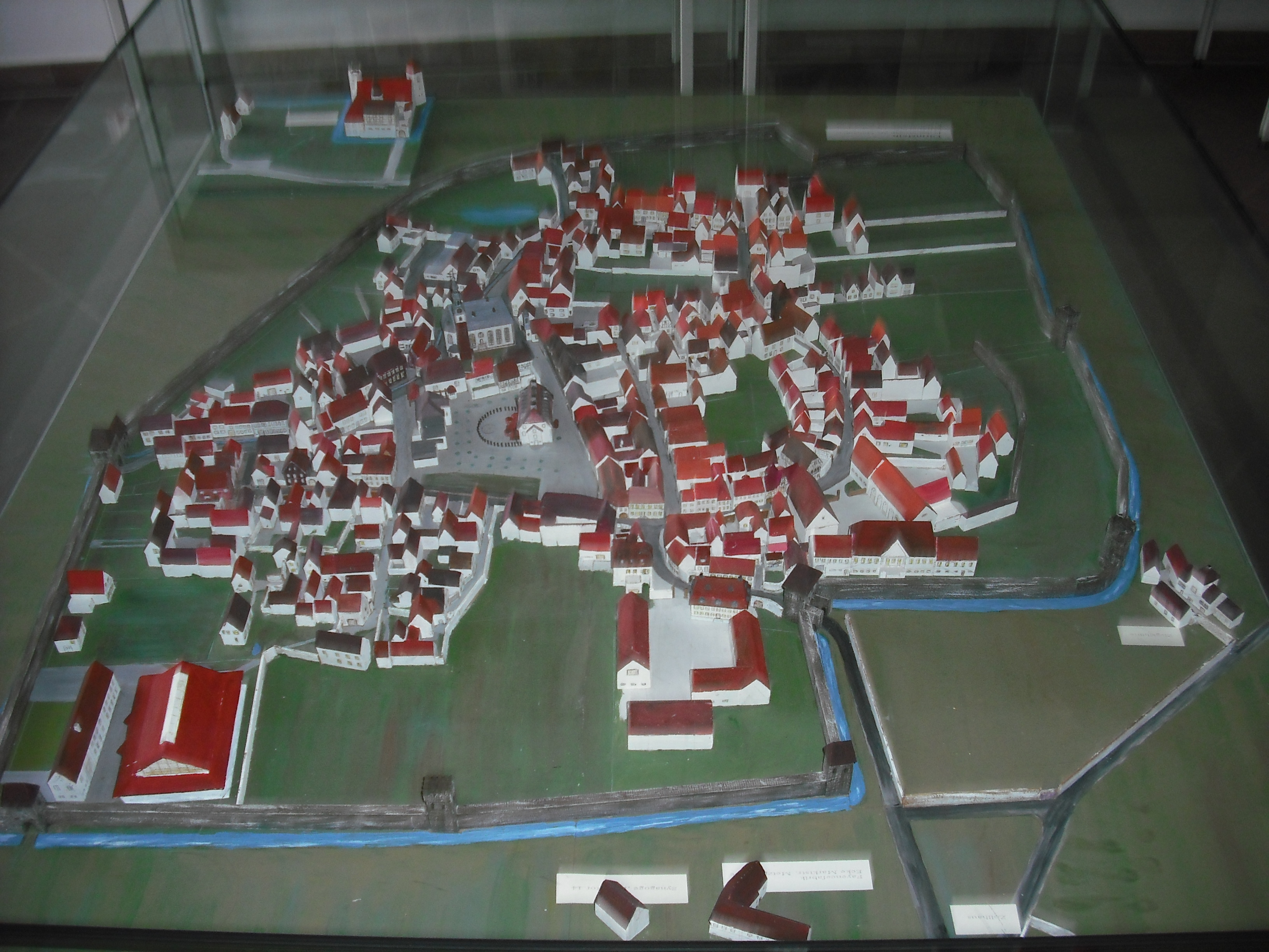 Modell der Gemeinde Dirmstein zur Barockzeit 1746, nach zeitgenössischer Karte nachgebaut; Süden ist oben